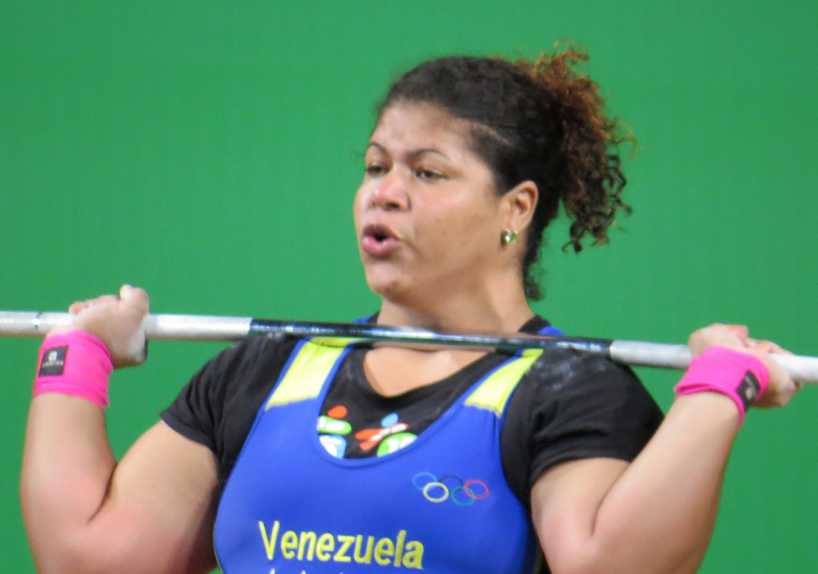 Yaniuska Espinosa, Rio Olympics